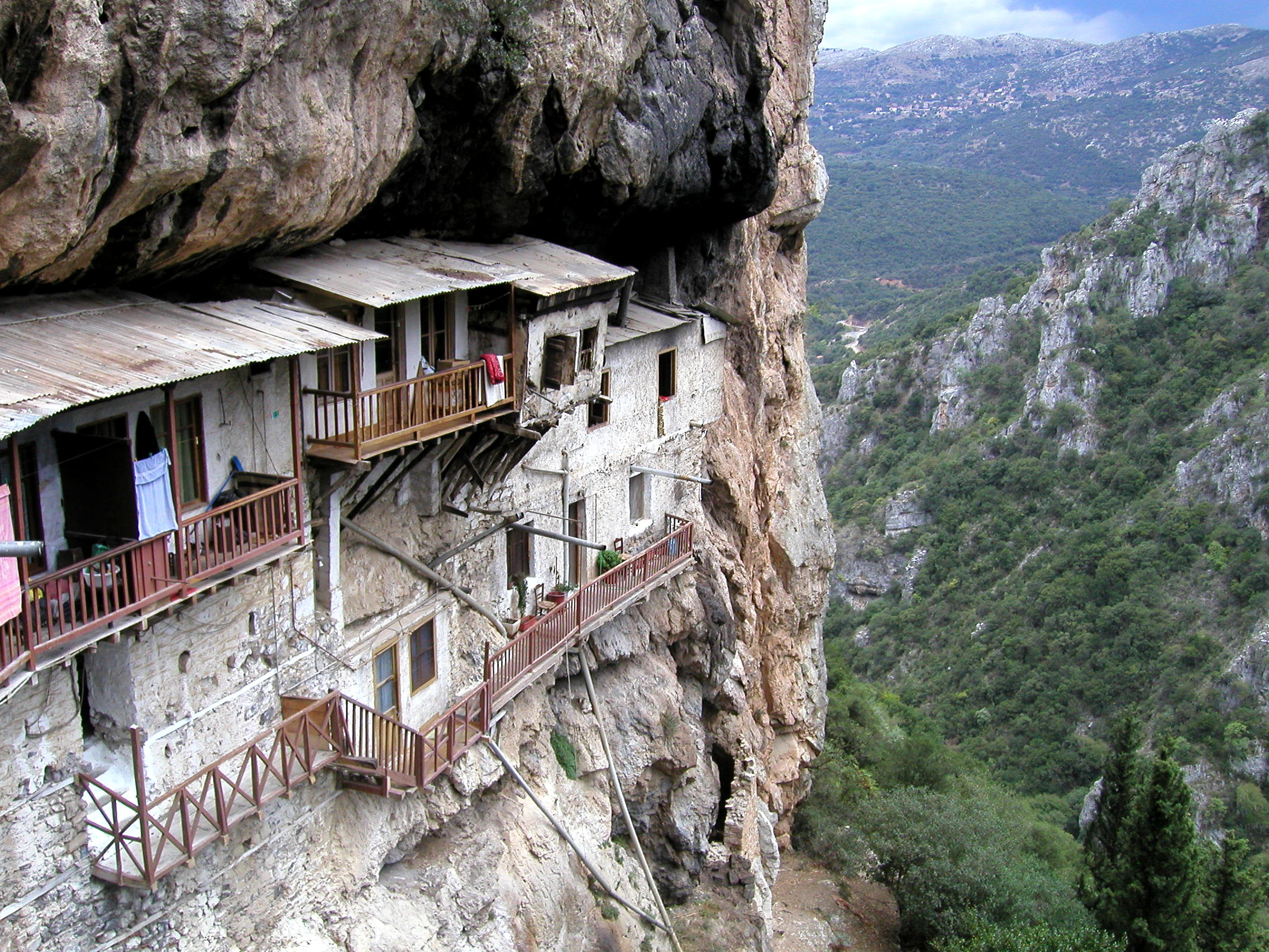 Beschreibung: Lousiosschlucht. Quelle: eigene Aufnahme am 25. September 2005 Fotograf: Roman Klementschitz, Wien (= Einer flog zu Weit)